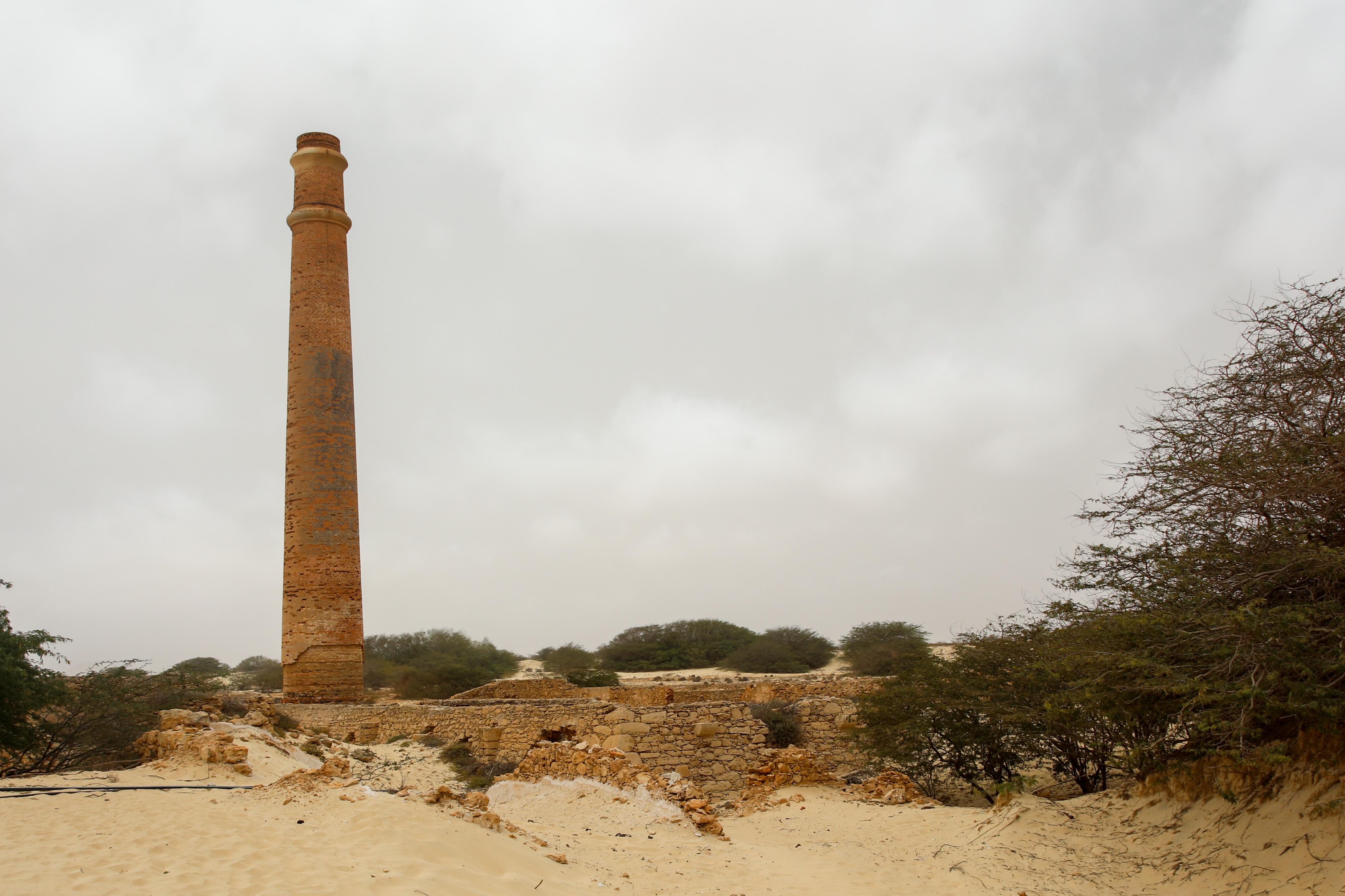 Reste der ehemaligen Ziegelfabrik in Rabil (Boavista/Kapverden)